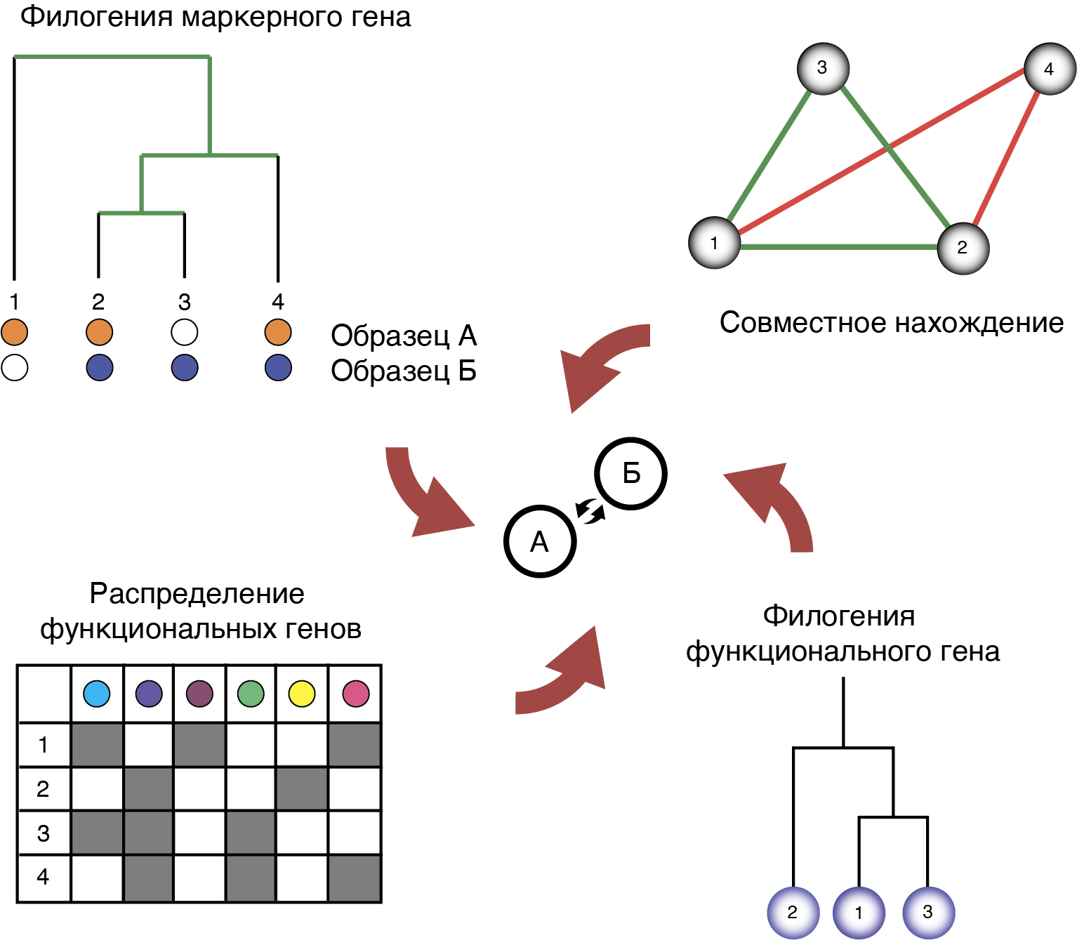 Данная схема демонстрирует примерную стратегию определения взаимодействий между видами внутри микробиома